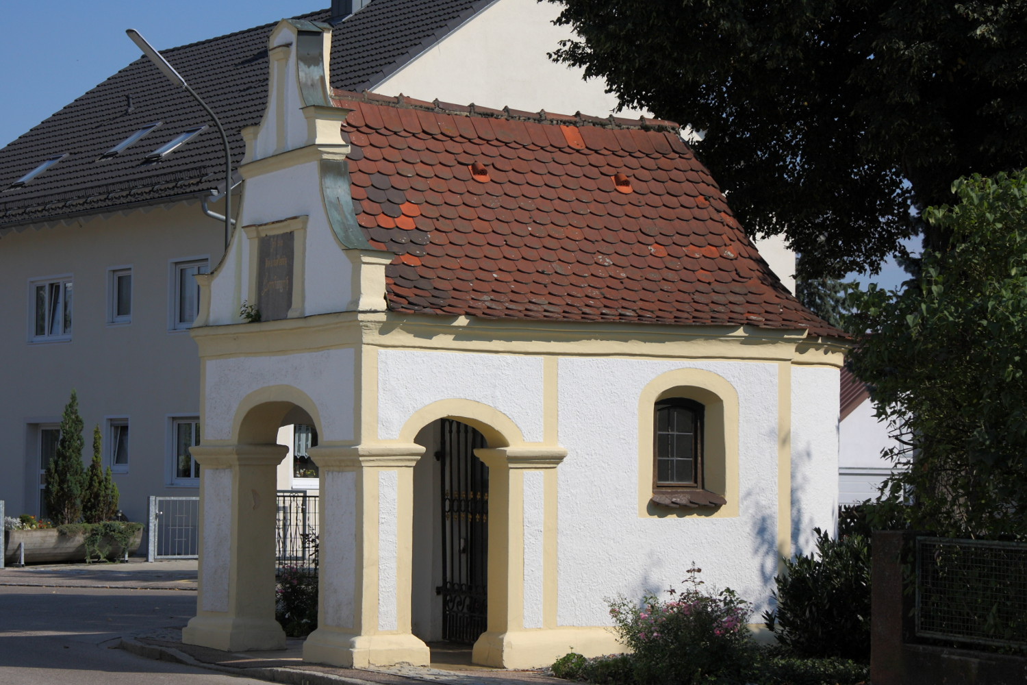 mit Vorhalle und Schweifgiebel, 1822;This is a photograph of an architectural monument.